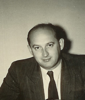 Charles Reichlin.jpg